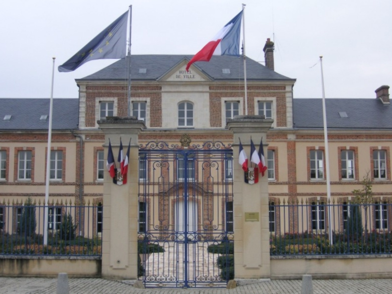 Damville, Hotel de Ville